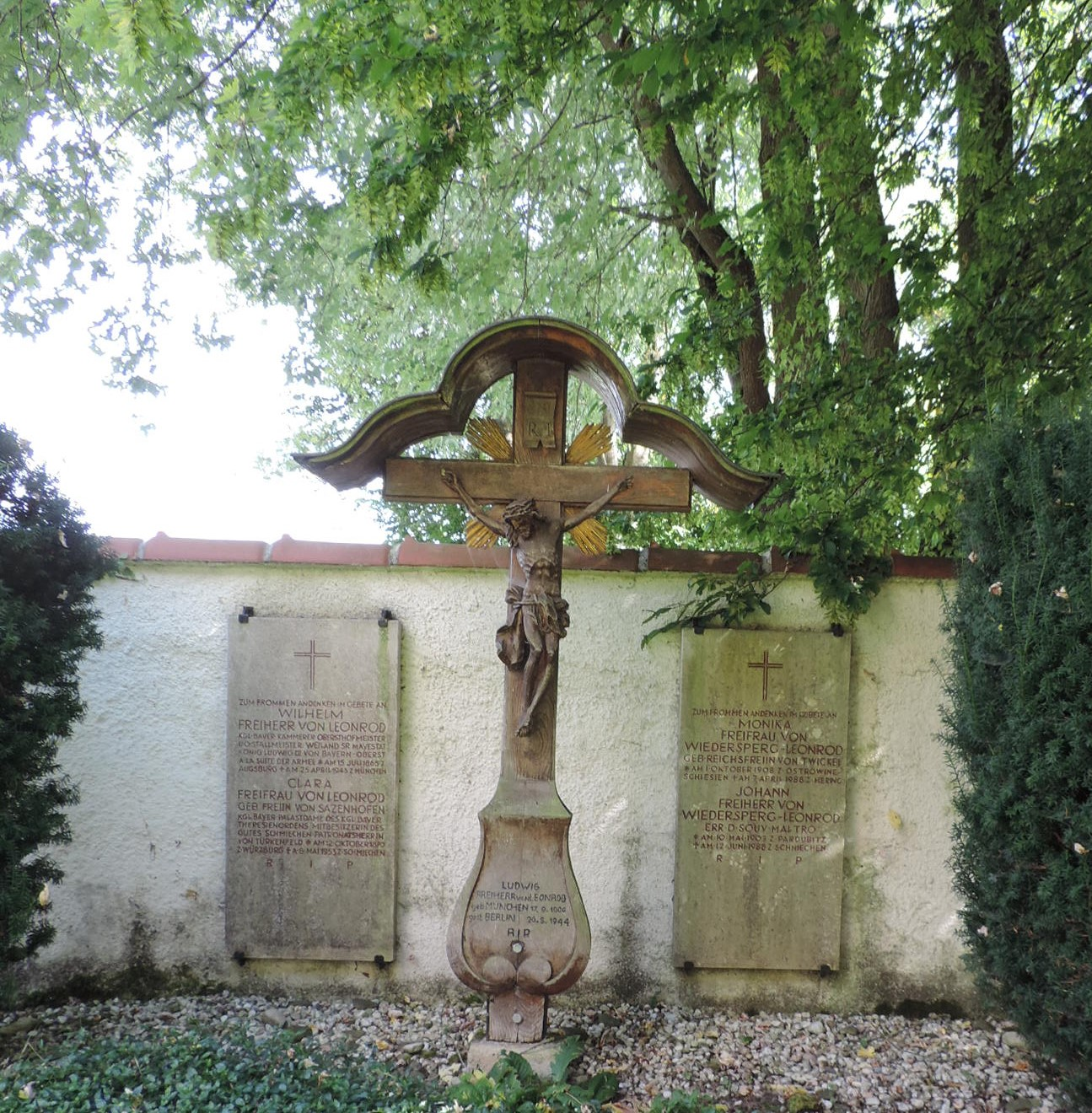 Grabstätte derer von Leonrod